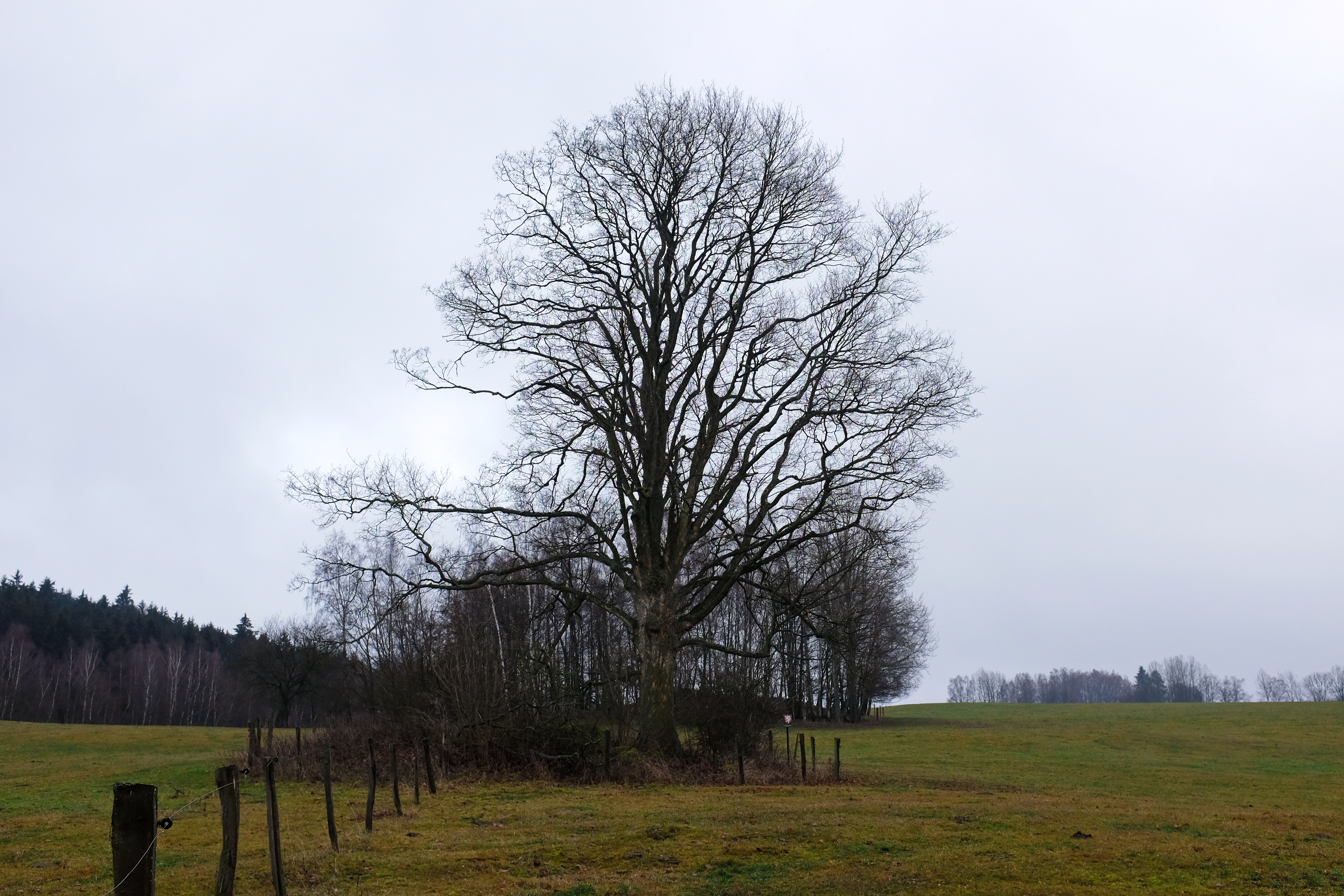 Památné stromy Javory v Arnoltově, vyšší z dvou javorů, Arnoltov, okres Sokolov